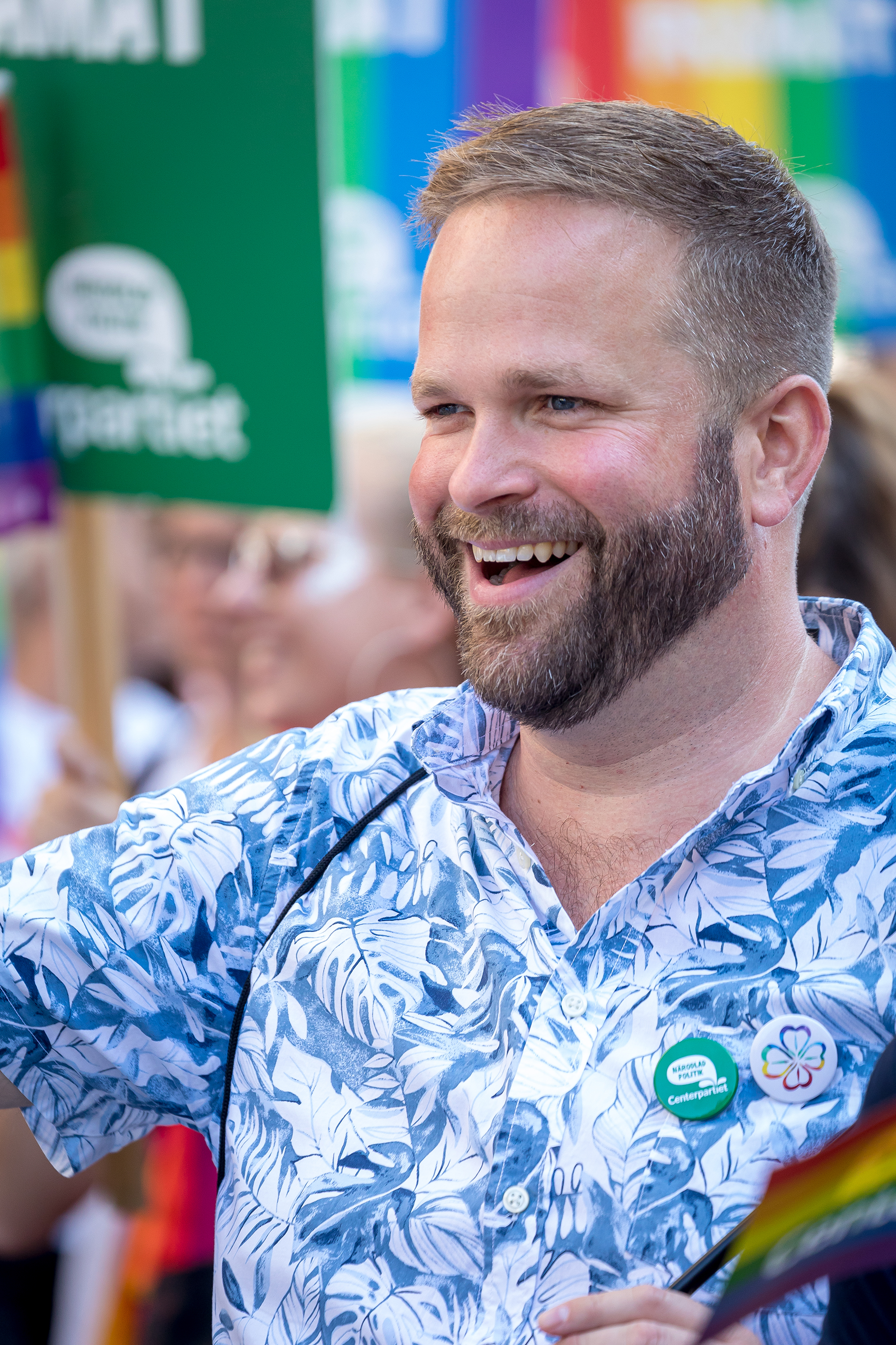 Jonas Naddebo, borgarråd i Stockholm under Stockholm Pride 2019.